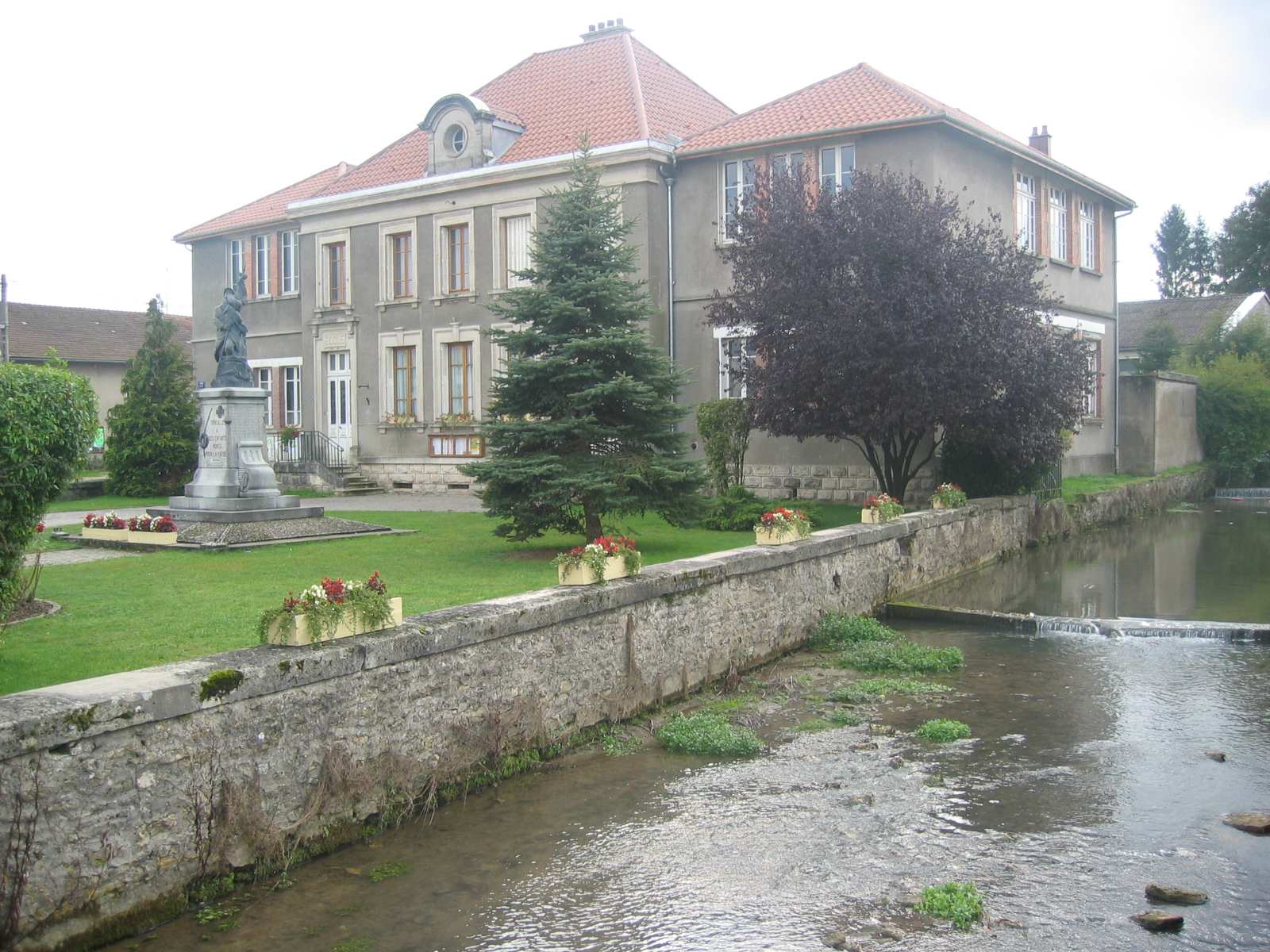 Mairie de Brieulles-sur-Meuse et ruisseau du Wassieu